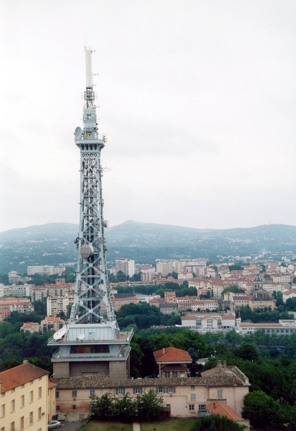 Lyon Tour métallique de Fourvière (Rhône (69) Auteur : GIRAUD Patrick